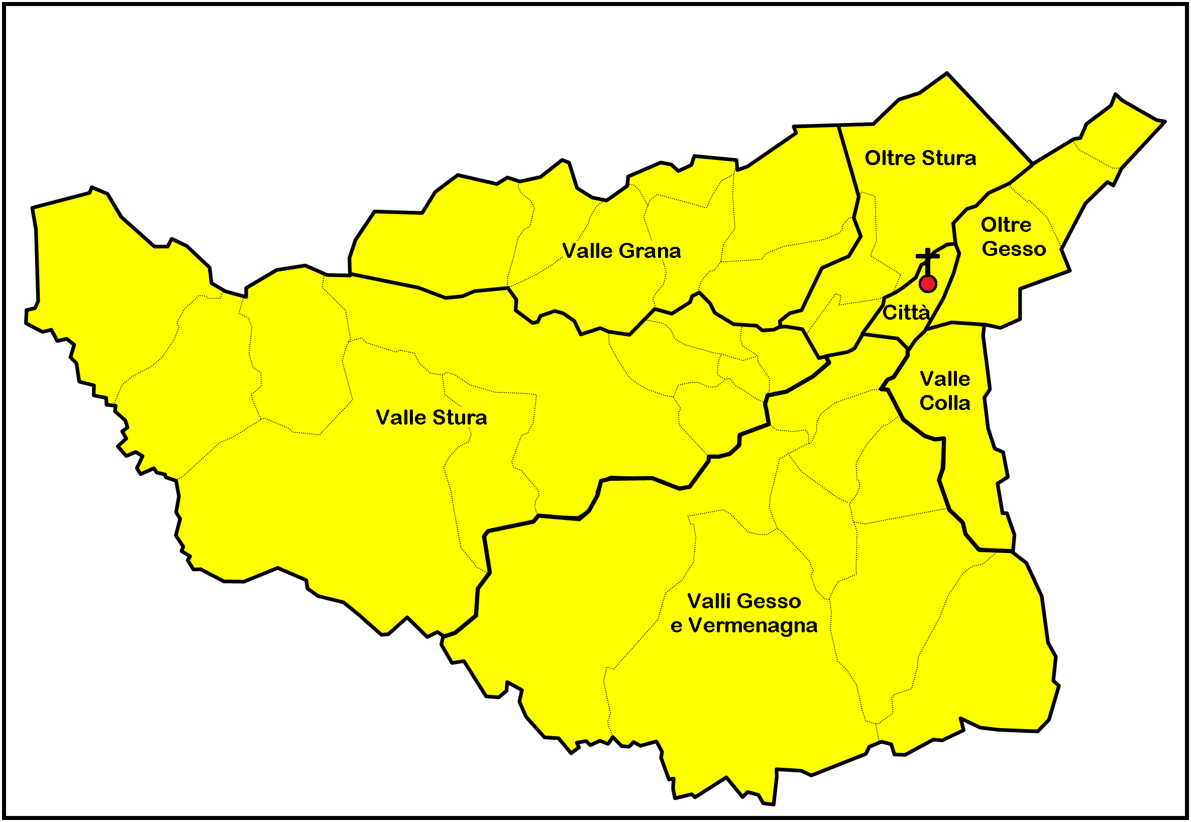 Mappa delle zone pastorali della Diocesi di Cuneo